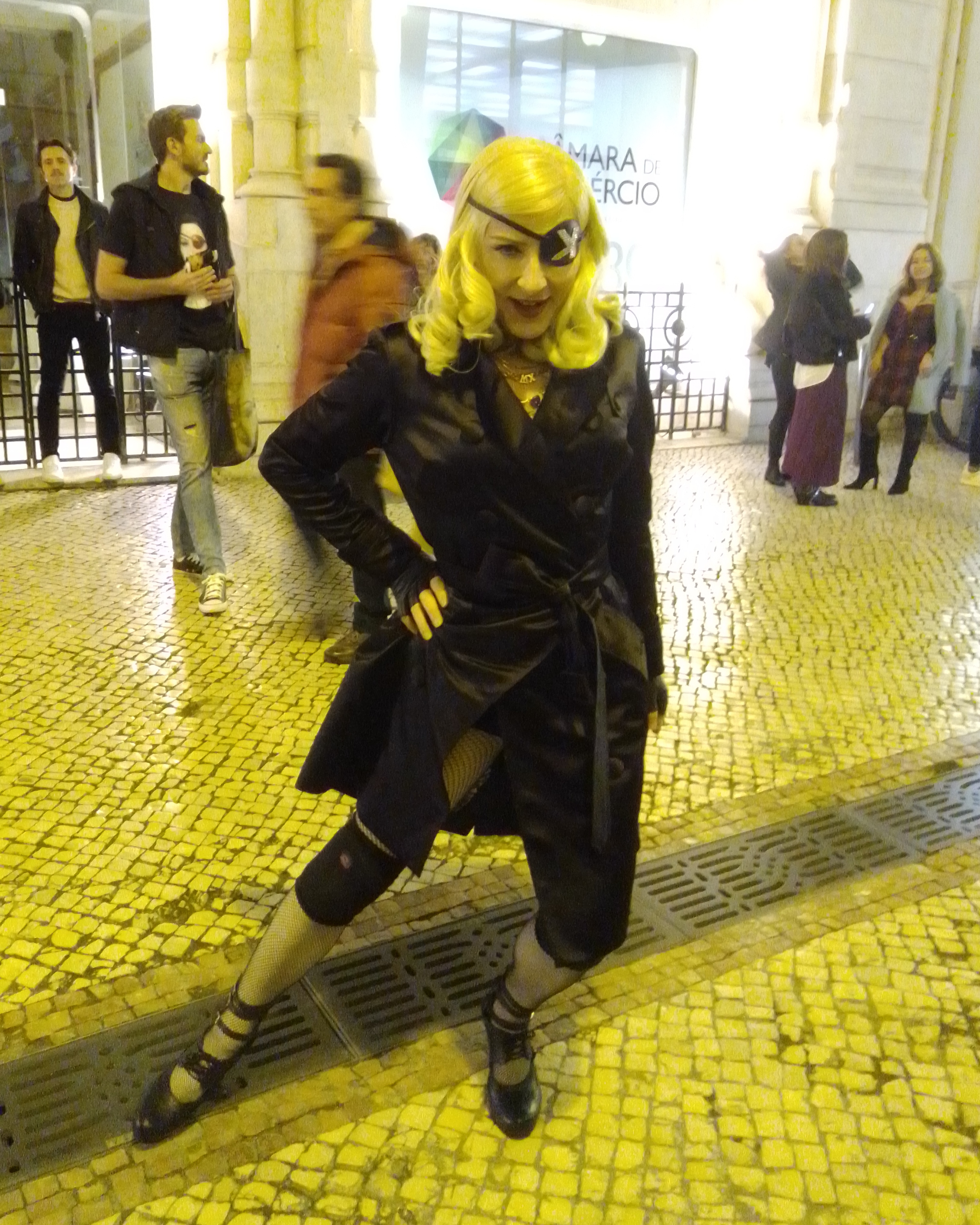 Rinaldo Madonna: Brazilian Madonna's impersonator in Lisbon 2020